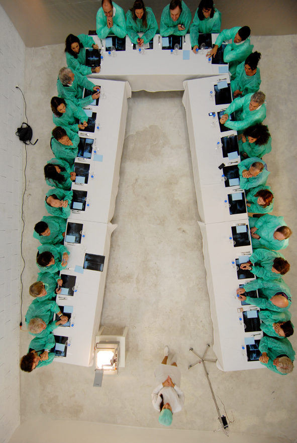 Le Diner Procréatif